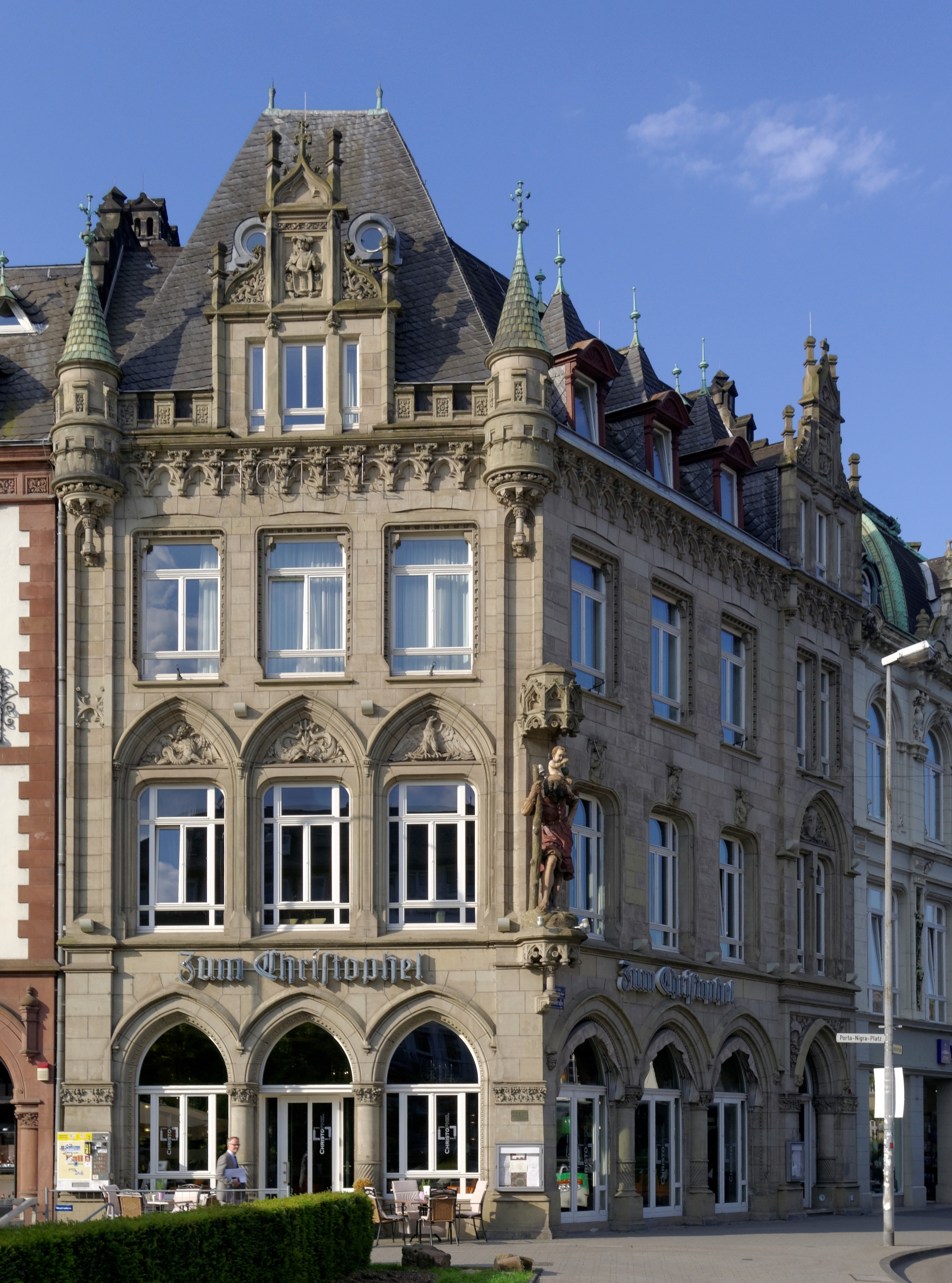 Trier, Simeonstraße 1, „Zum Christophel“; Miets- und Geschäftshaus, 1895–97 vom Bauunternehmer August Herrestahl errichtet, Eckhaus zum Porta-Nigra-Platz mit zwei unterschiedlichen, reich gegliederten sandsteinsichtigen Fassaden; gehört zu den qualitätvollsten Bauten der Neugotik in Trier